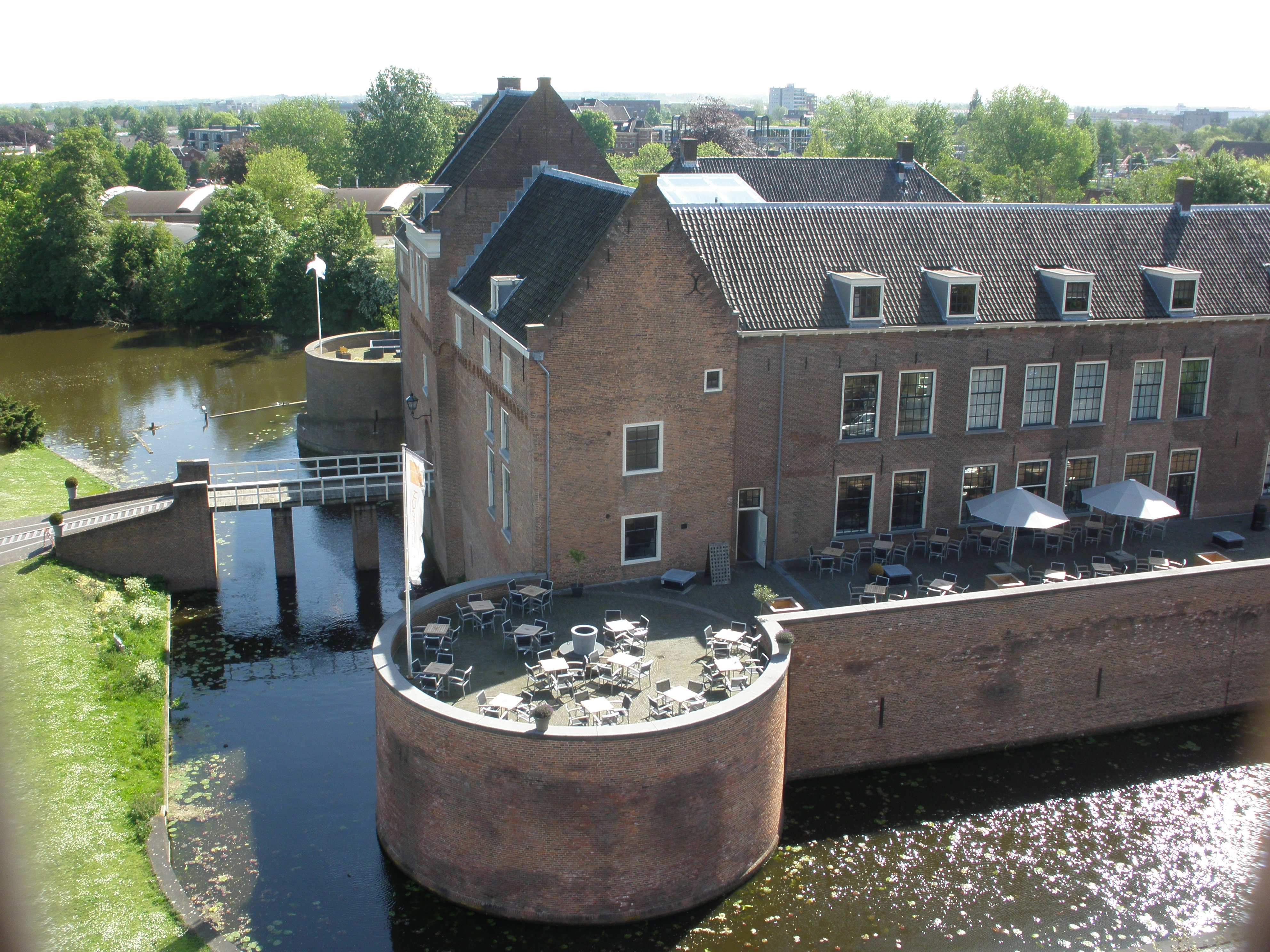 Kasteel Woerden gezien vanuit de toren van de Bonaventurakerk.